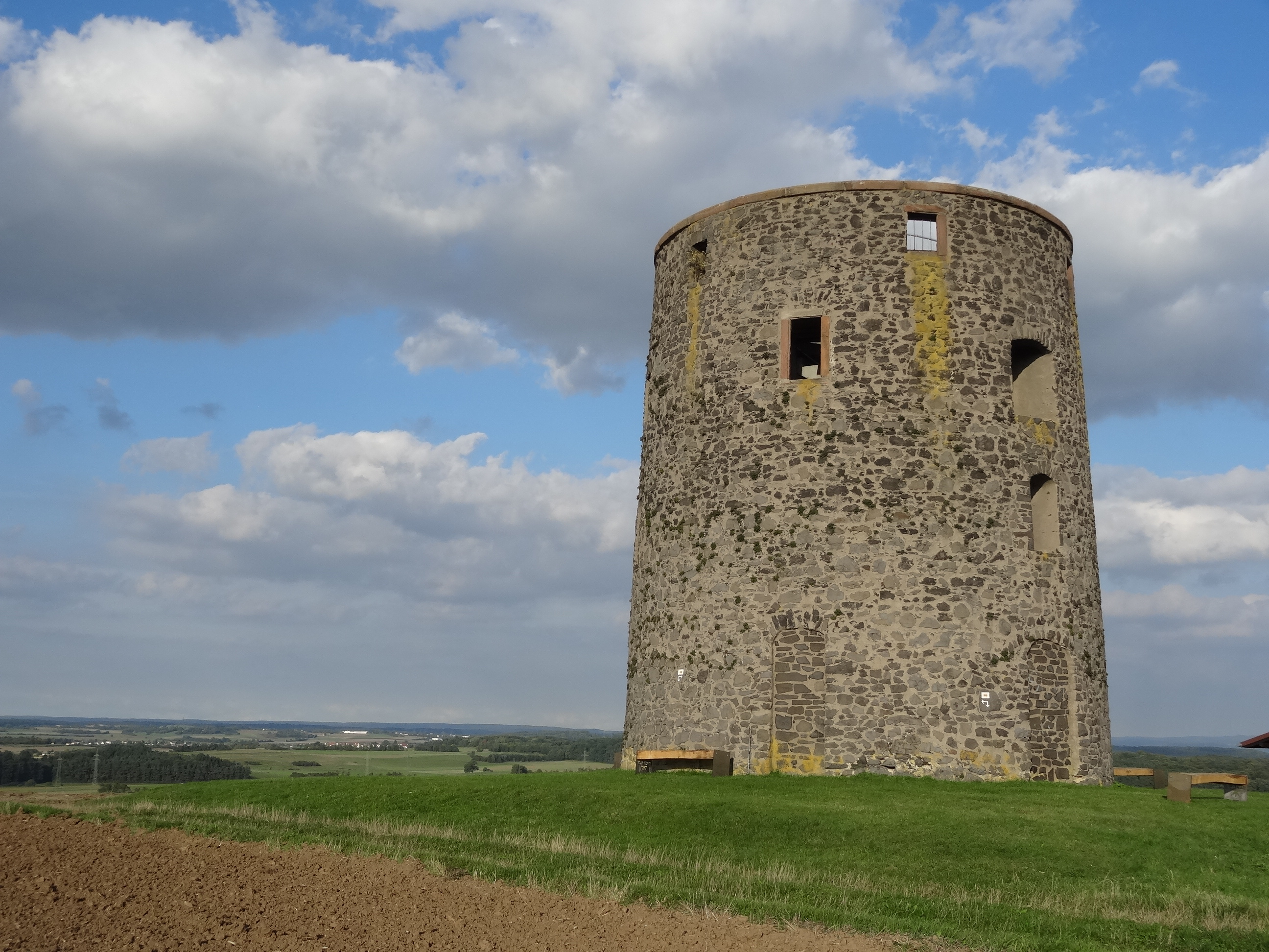 Grüninger Warte